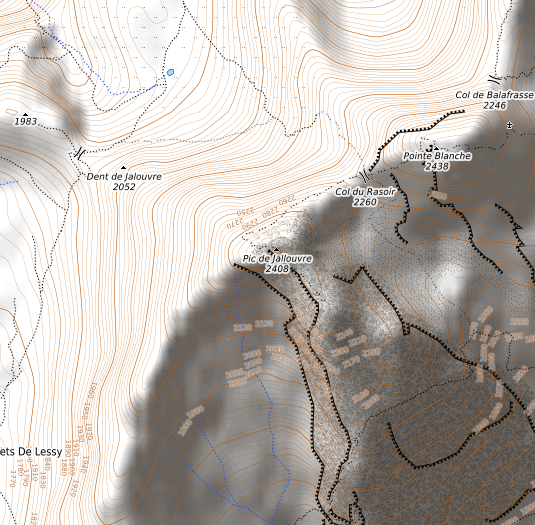 carte réalisée sur umap This map may be incomplete, and may contain errors. Don't rely solely on it for navigation.